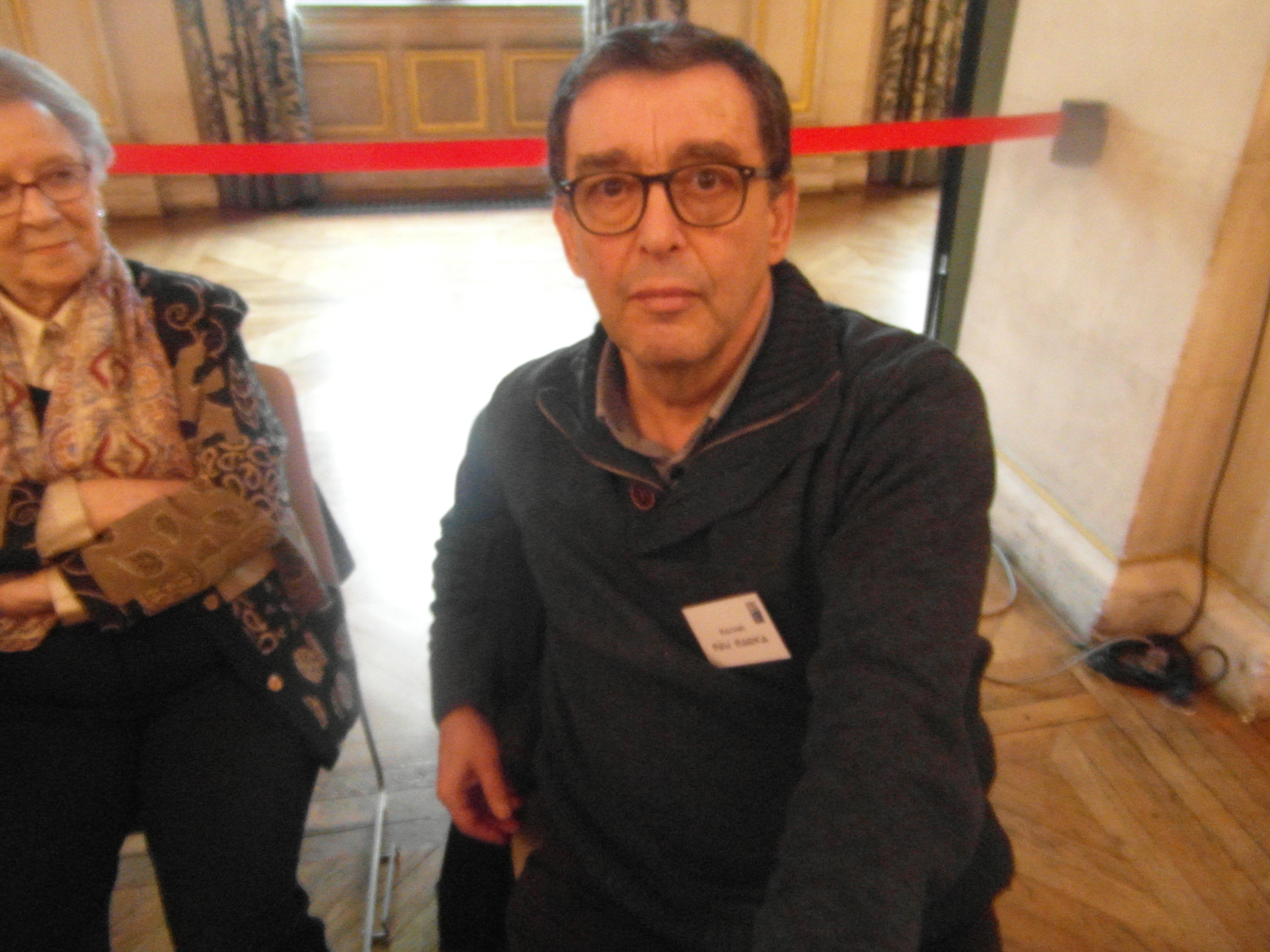 Bachir Ben Barka, fils du disparu, militant toujours pour la fin de la raison d'État obstruant les recherches sur les conditions de disparition de son père. 22e Maghreb des Livres, 13 et 14 février 2016